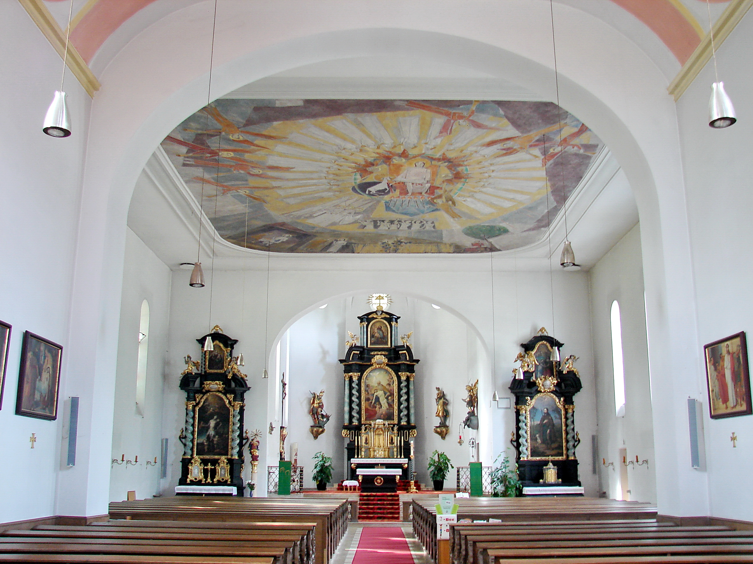 Die römisch-katholische Dreifaltigkeitskirche steht auf dem Dreifaltigkeitsberg.